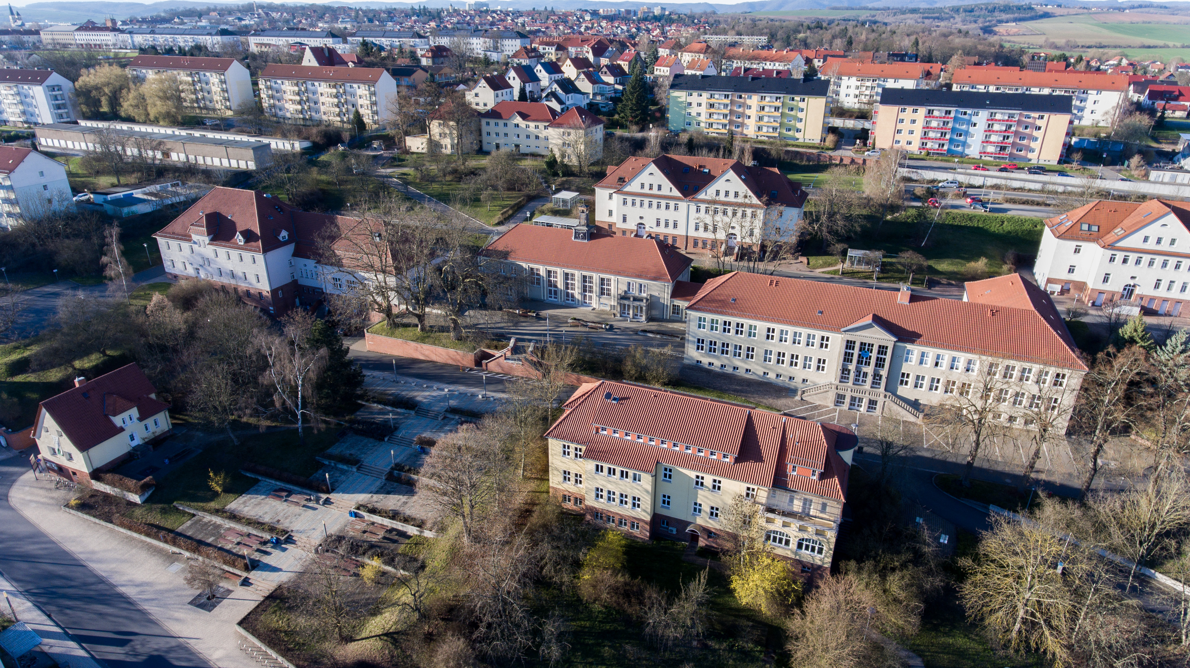 Luftaufnahme der Hochschule Nordhausen, Bildmitte der Audimax.